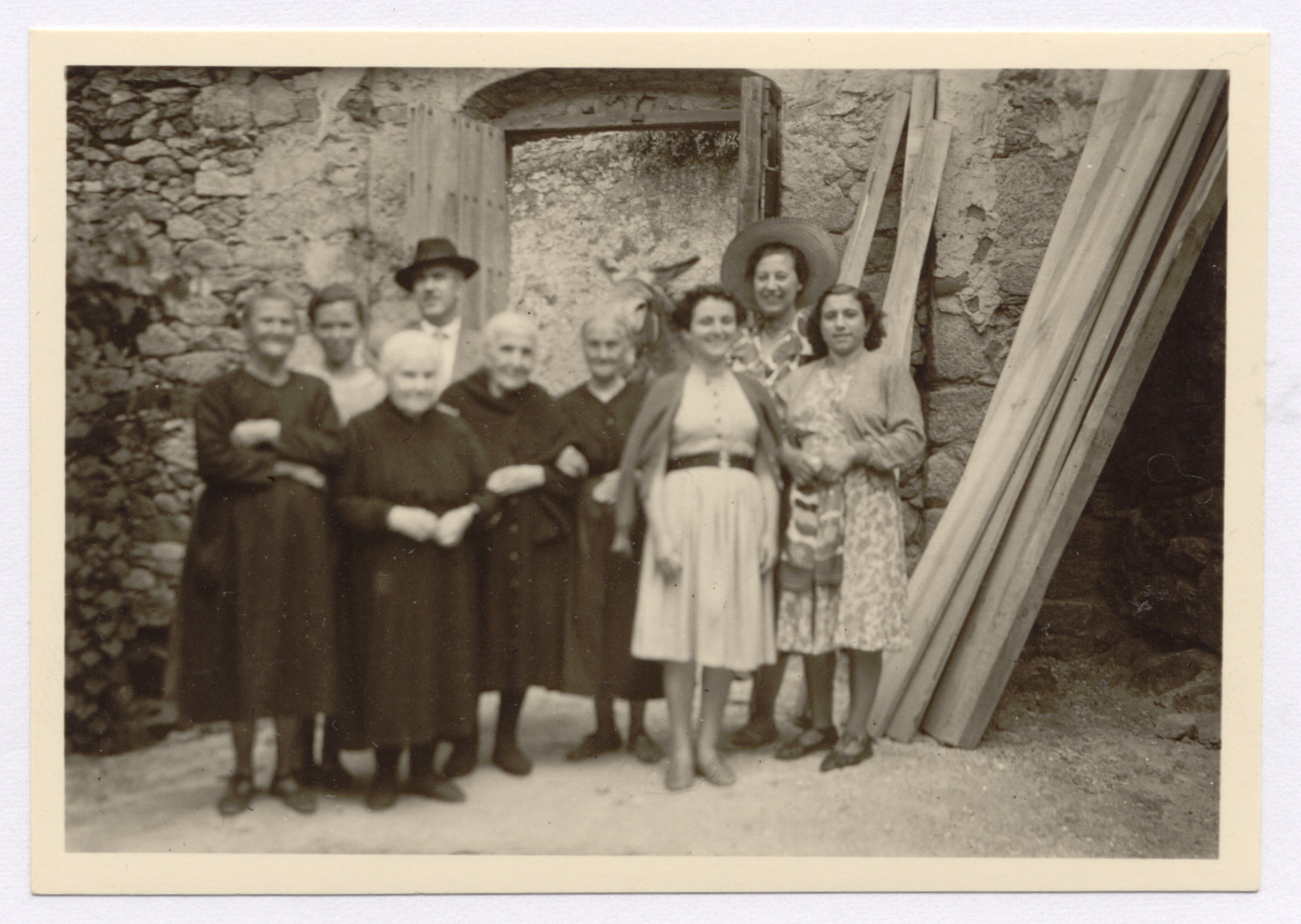 Interior de la iglesia evangélica de Ibahernando (Cáceres).